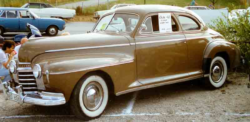 1941 Oldsmobile Series 60 Coupé